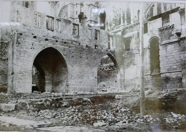 Puerta Obispo antes de su derribo